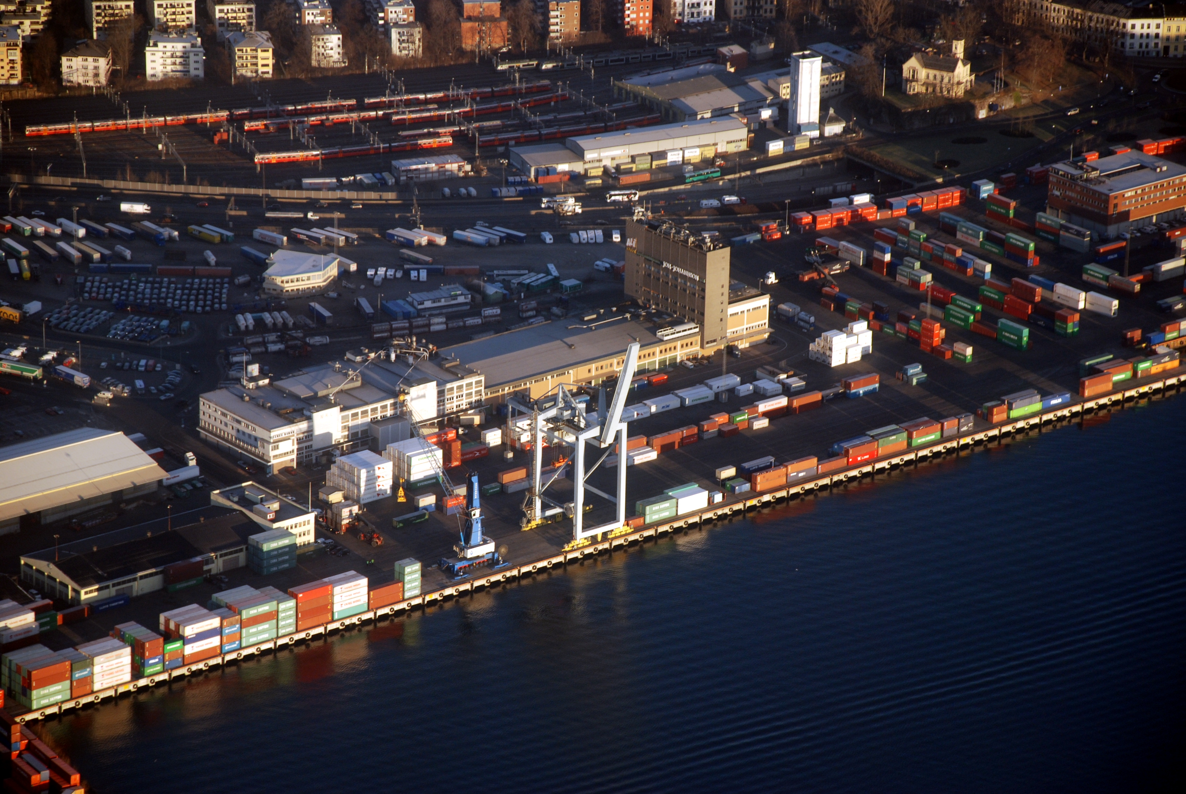 kontainerhavnen på Filipstad i Oslo